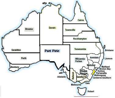 Eigenarbeit